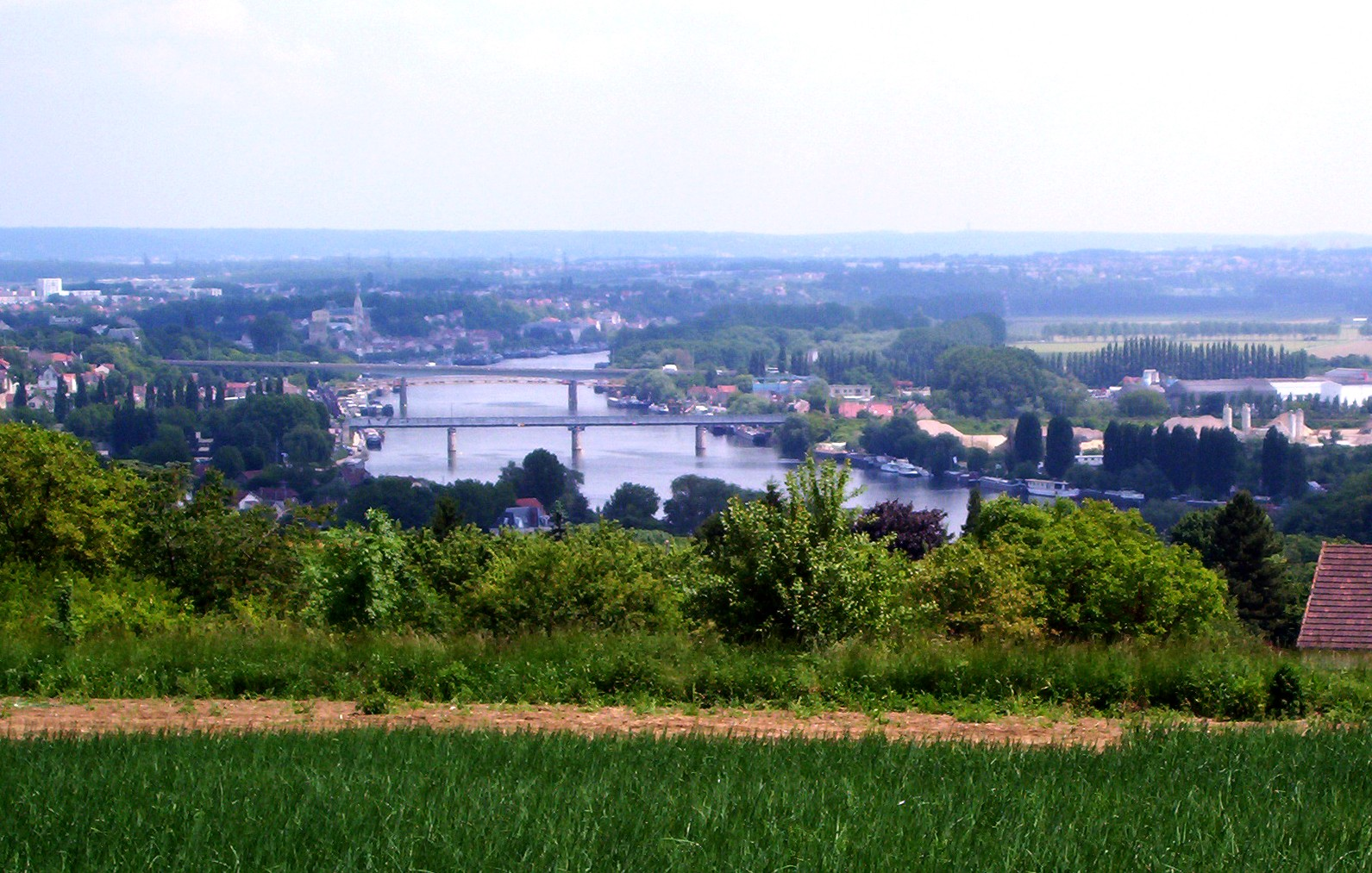 Vue panoramique sur la Seine, à gauche Conflans-Sainte-Honorine, au centre la Seine, à droite la plaine agricole d'Achères. Vue prise vers l'Est depuis Chanteloup les Vignes